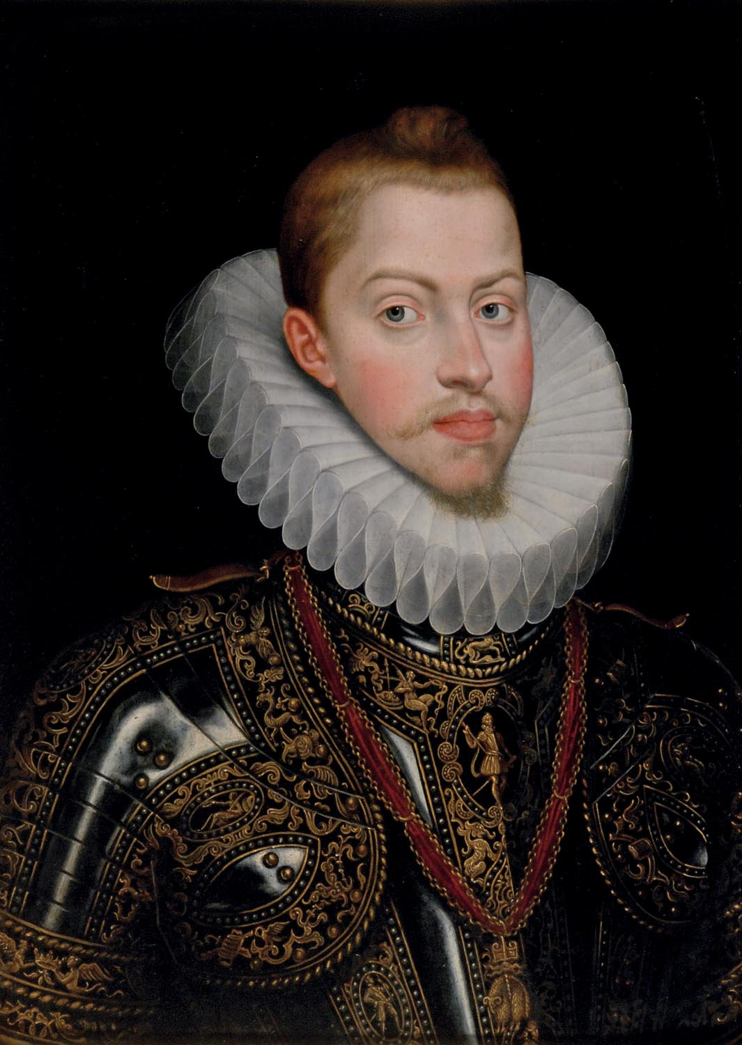 Retrato del rey Felipe III de España (1578-1621), hijo y heredero de Felipe II.